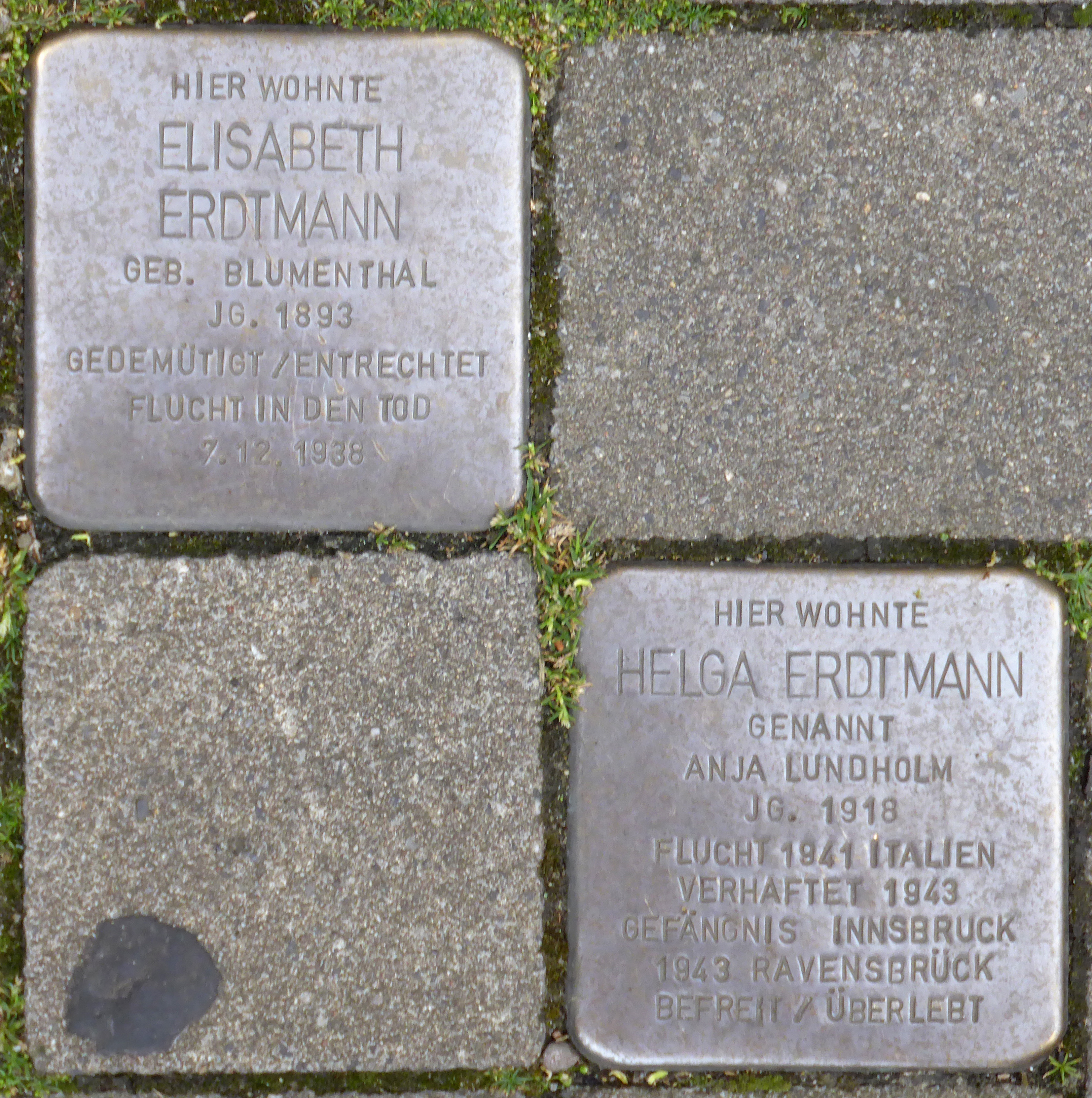 Stolperstein: Verlegestelle Uerdinger Straße 1, Krefeld.